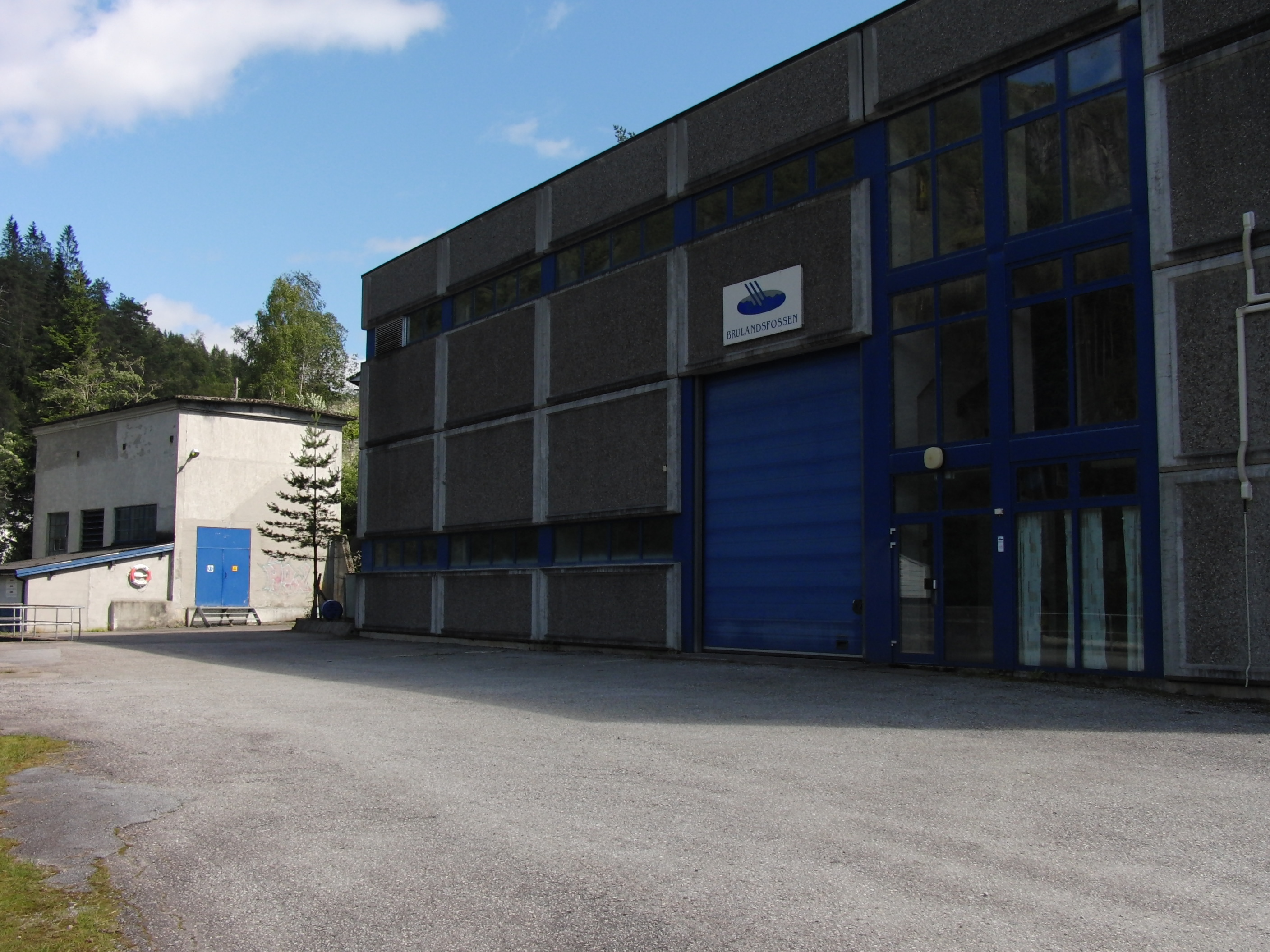 Brulandsfossen kraftverk